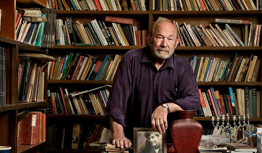 פרופסור שלמה גיורא שוהם